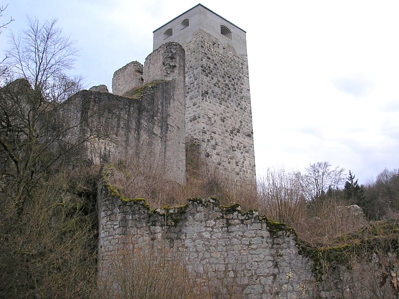 Burg Wellheim, die Burg von Nordosten. Ringmauer, Palas und Bergfried